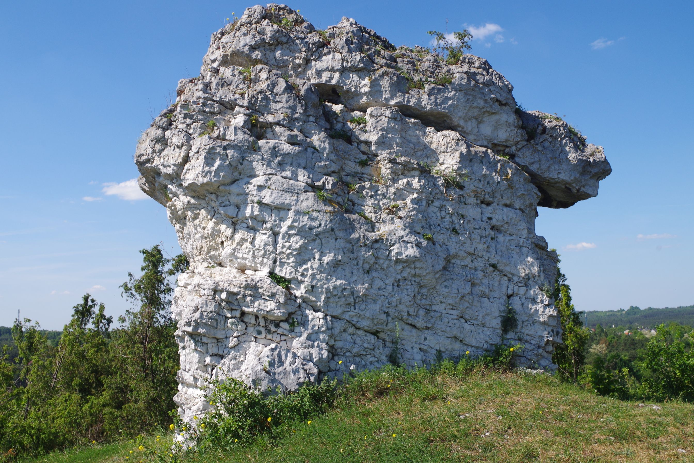 Skała Grzybki na wzgórzu Lipówki w Olsztynie